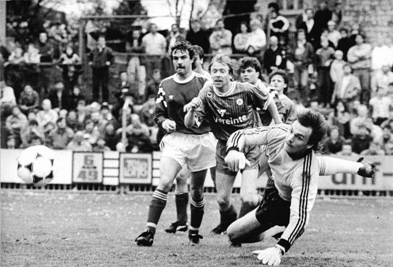 ADN-Pätzold-14.4.90- Schwerin: Im Halbfinale um den FDGB-Pokal errang Dynamo Schwerin einen sensationellen 1:0-Sieg über den 1. Lok Leipzig. Unter großem Einsatz hielt Torwart Andreas Reinke dem Druck der Leipziger stand.